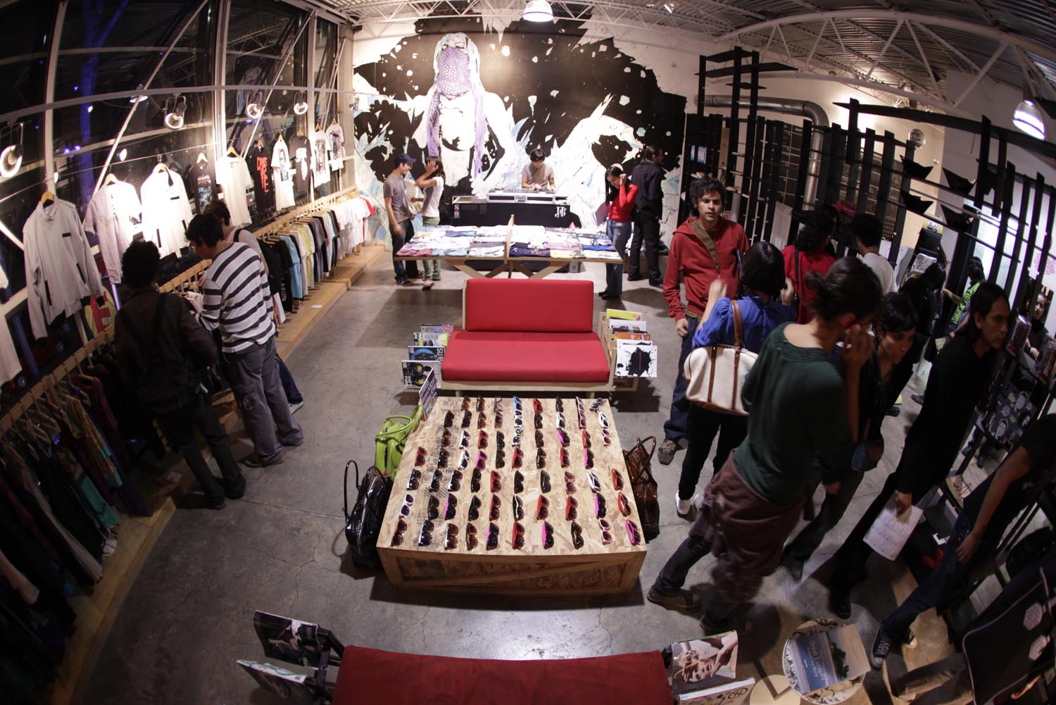 Actividades del Corredor Cultural Roma Condesa 2009. Donación de imágenes acuerdo GLAM Wikimedia México / Corredor Cultural Roma Condesa.